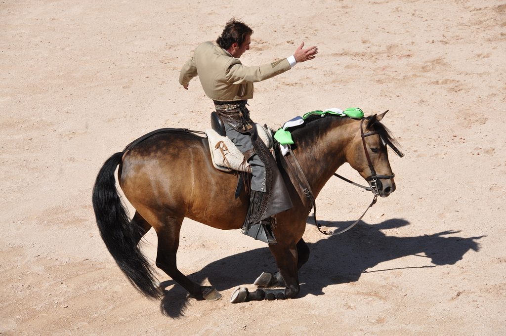 Andy Cartagena à Arles en 2010 - Corrida de rejon.